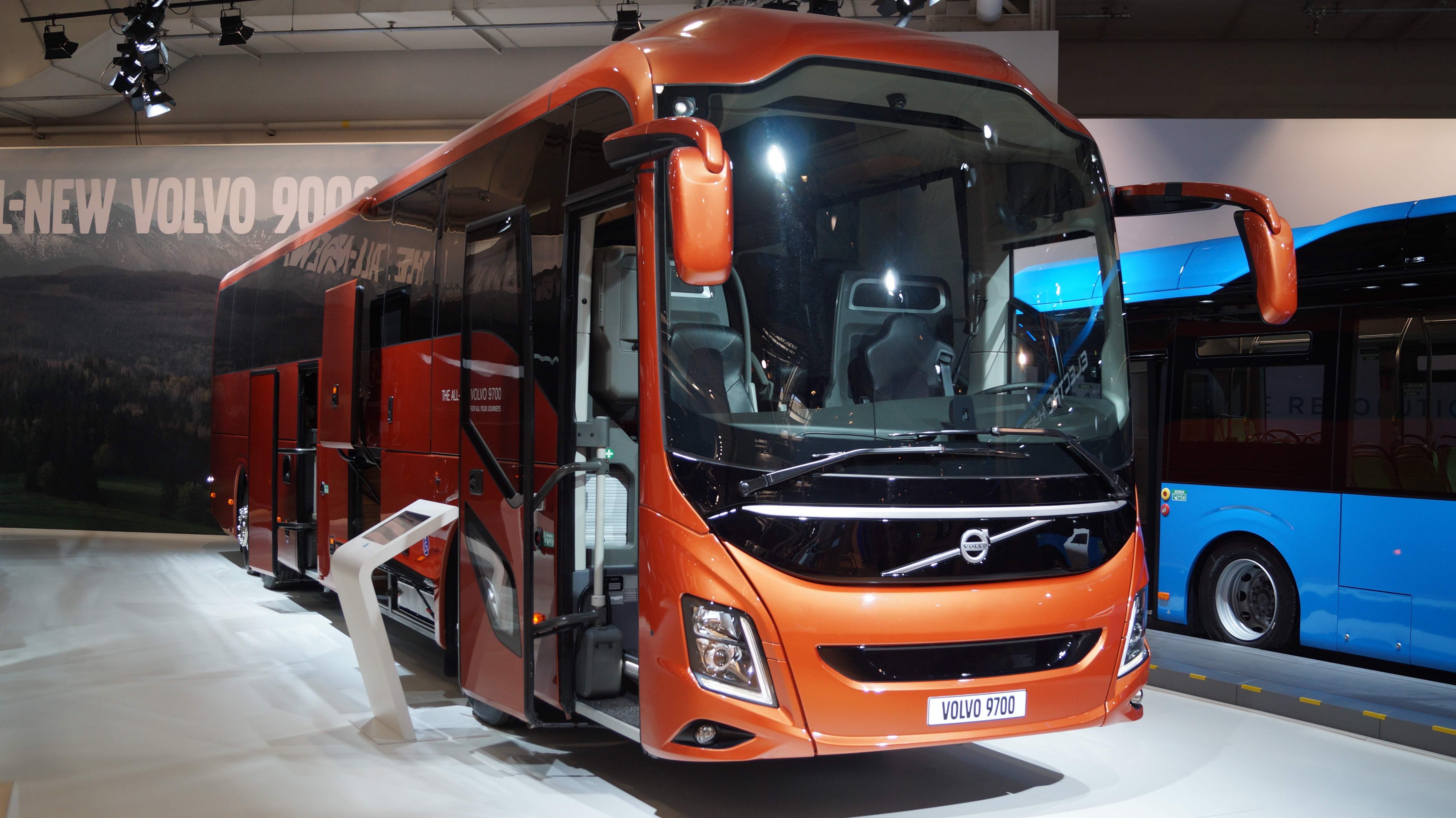 Schrägansicht der Front eines Volvo 9700 13,9m 6x2, ausgestellt auf der IAA 2018.